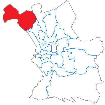 Situation du canton dans la ville de Marseille